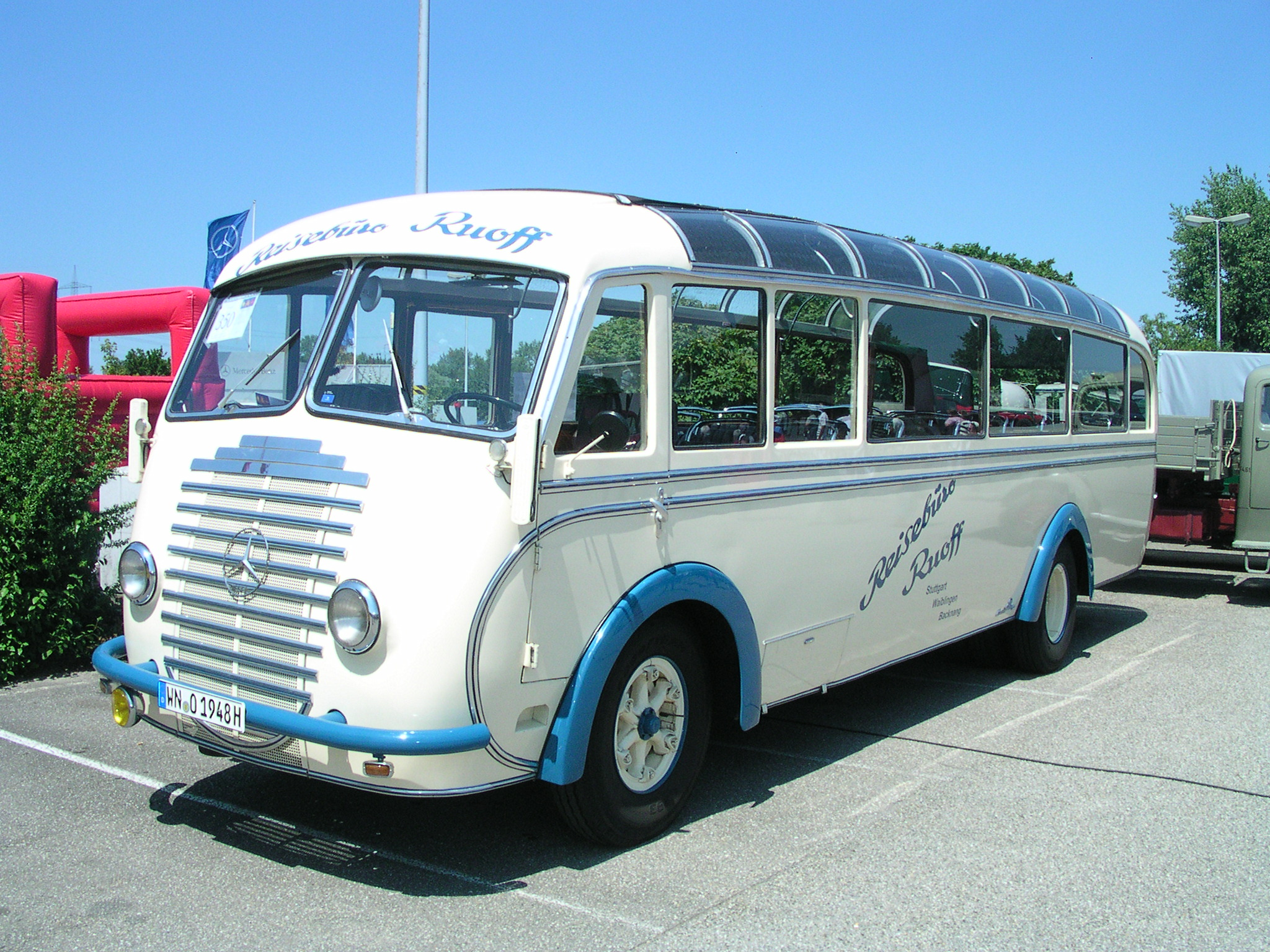 Oldtimer-Treffen bei Daimler-Chrysler in Wörth am Rhein. Bei Gottlob Auwärter in Stuttgart Möhringen 1948 hergestellter Reisebus auf einem 1940 produziertem Mercedes OP 3750-Chassis.